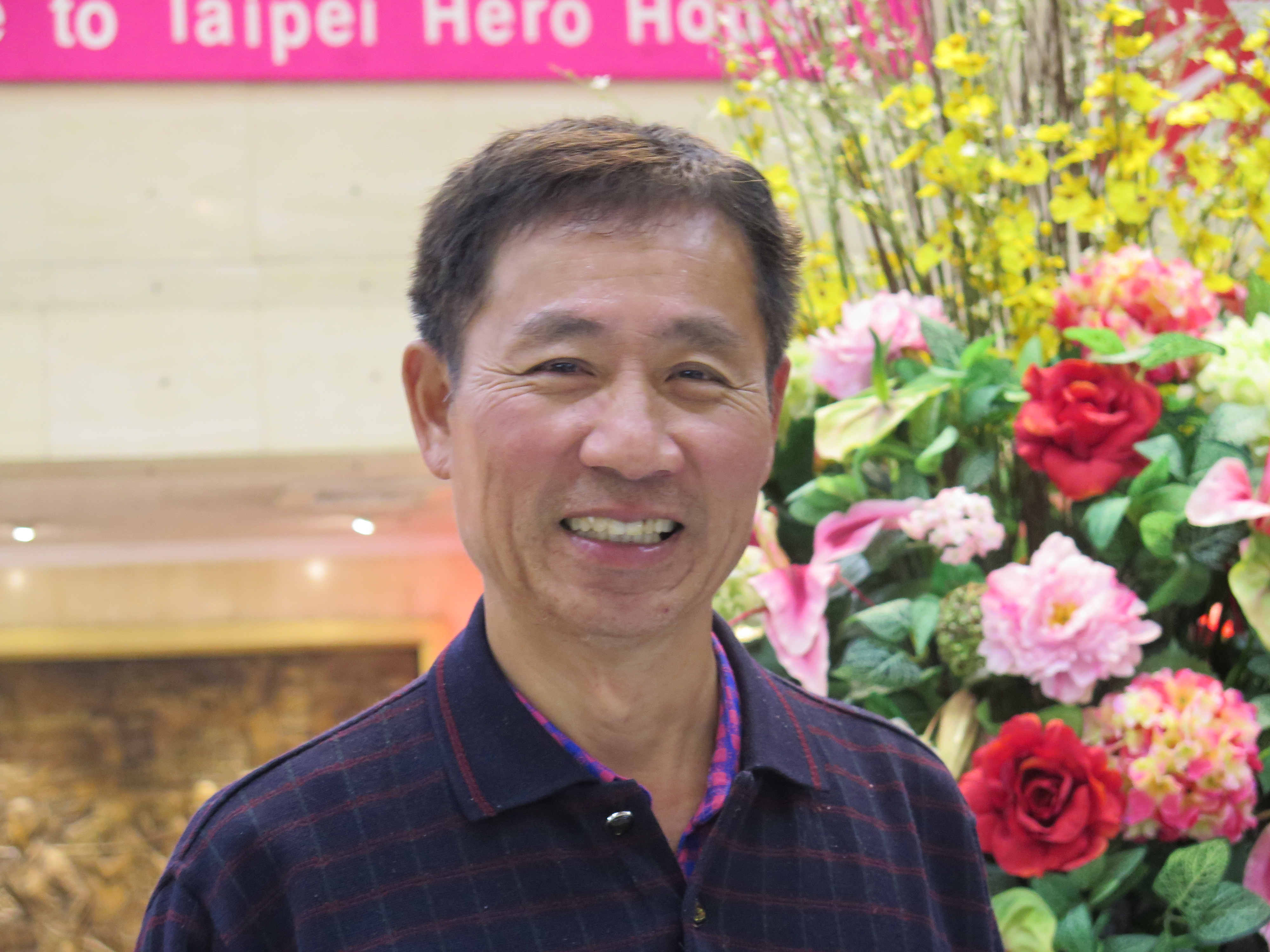 郭坤仁為「從前從前有個紅衛兵(天讎)」新書發表返台接受採訪